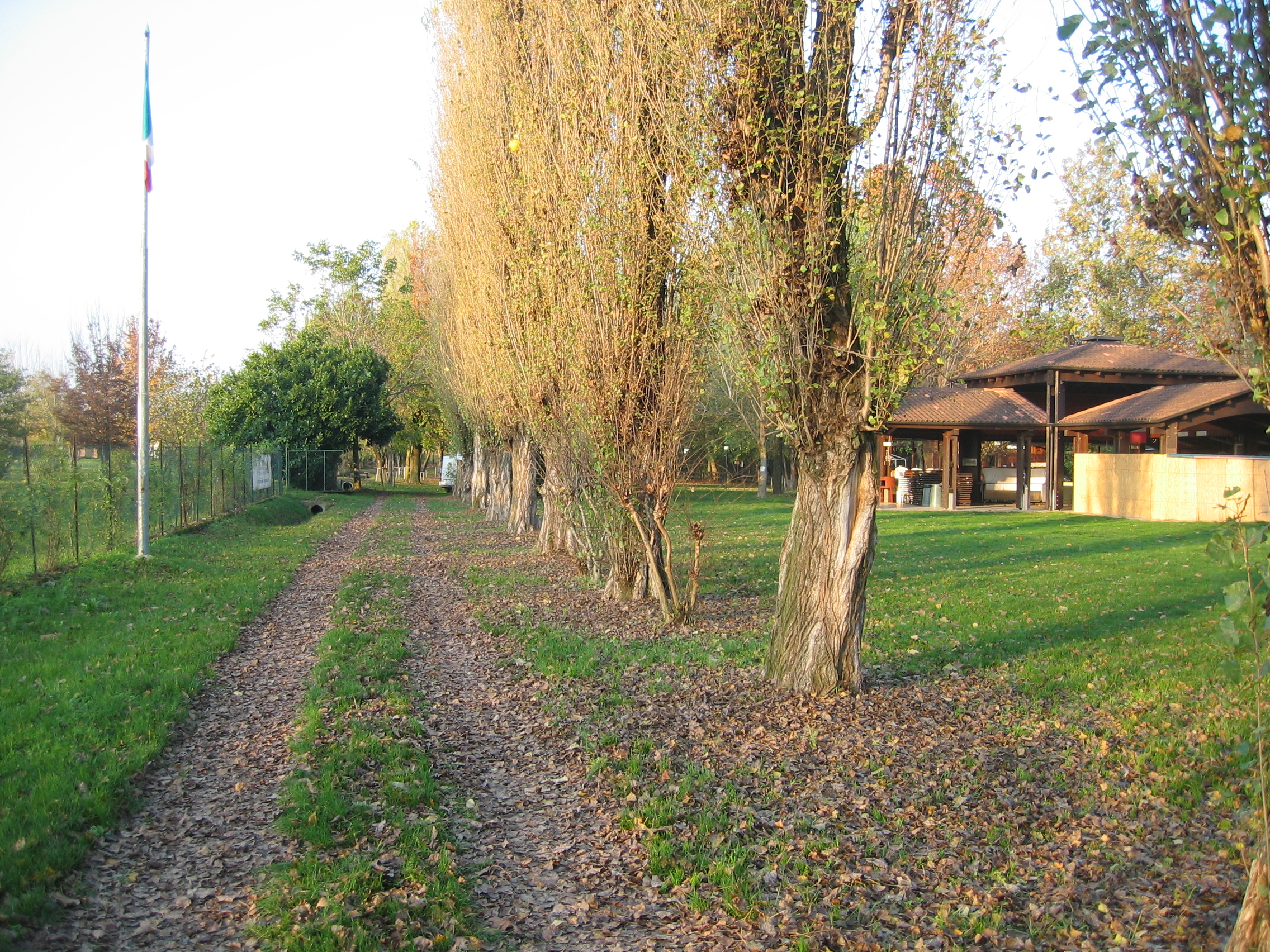 La strada principale del Roccolo.